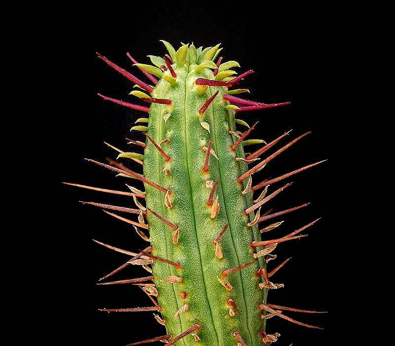 Euphorbia cumulata